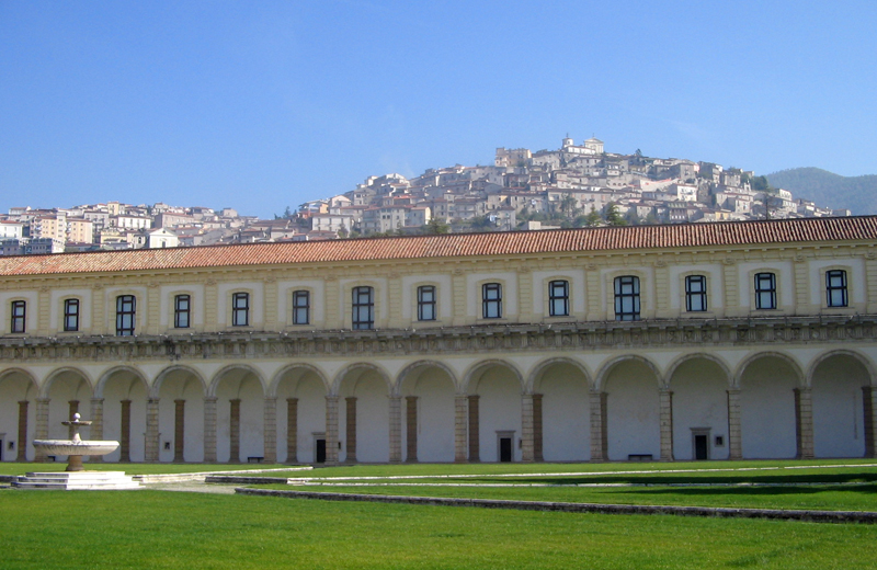 Panorama di Padula (SA) dalla Certosa di San Lorenzo - Foto D. Pennisi.